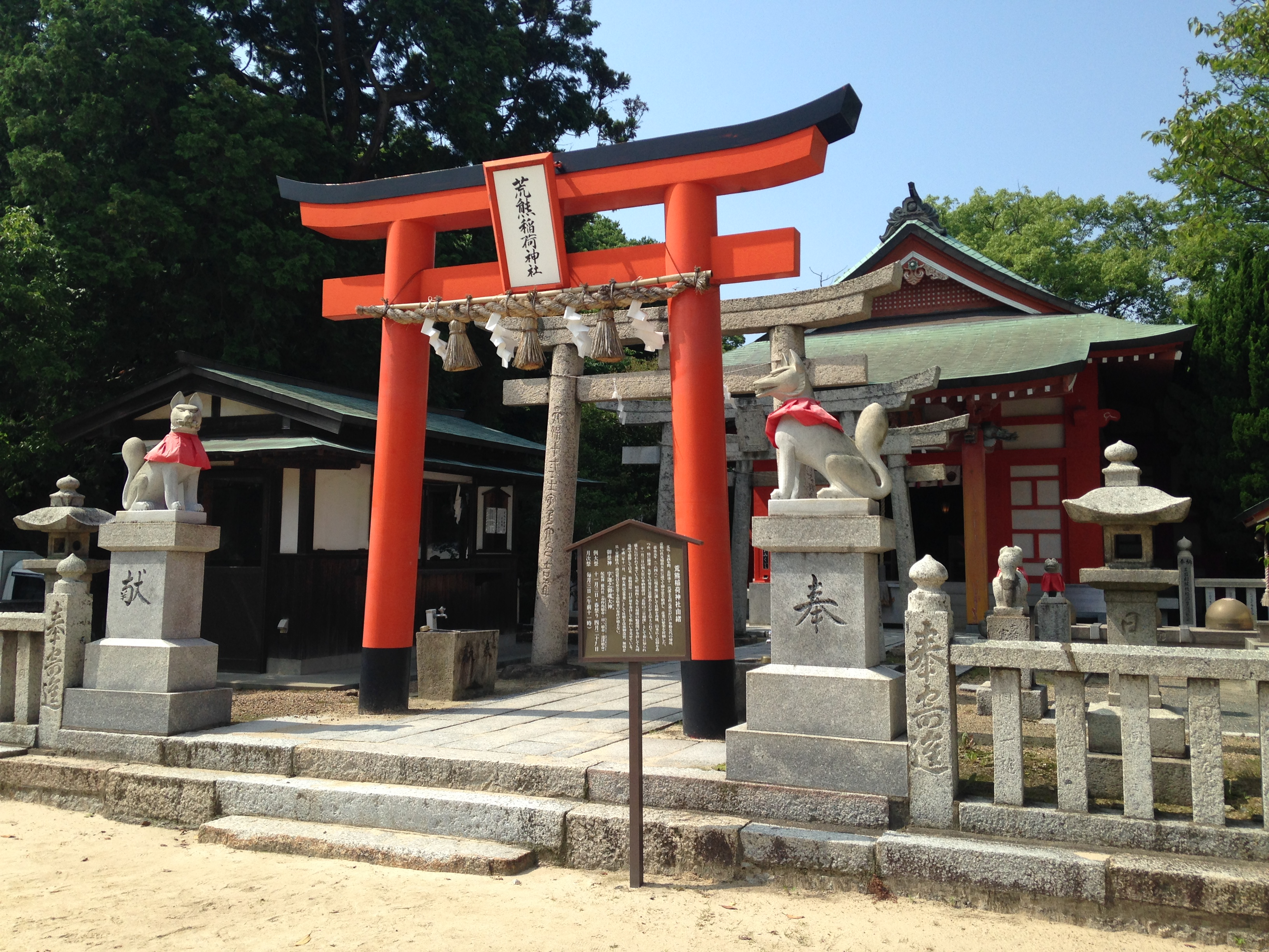 忌宮神社境内・荒熊稲荷神社